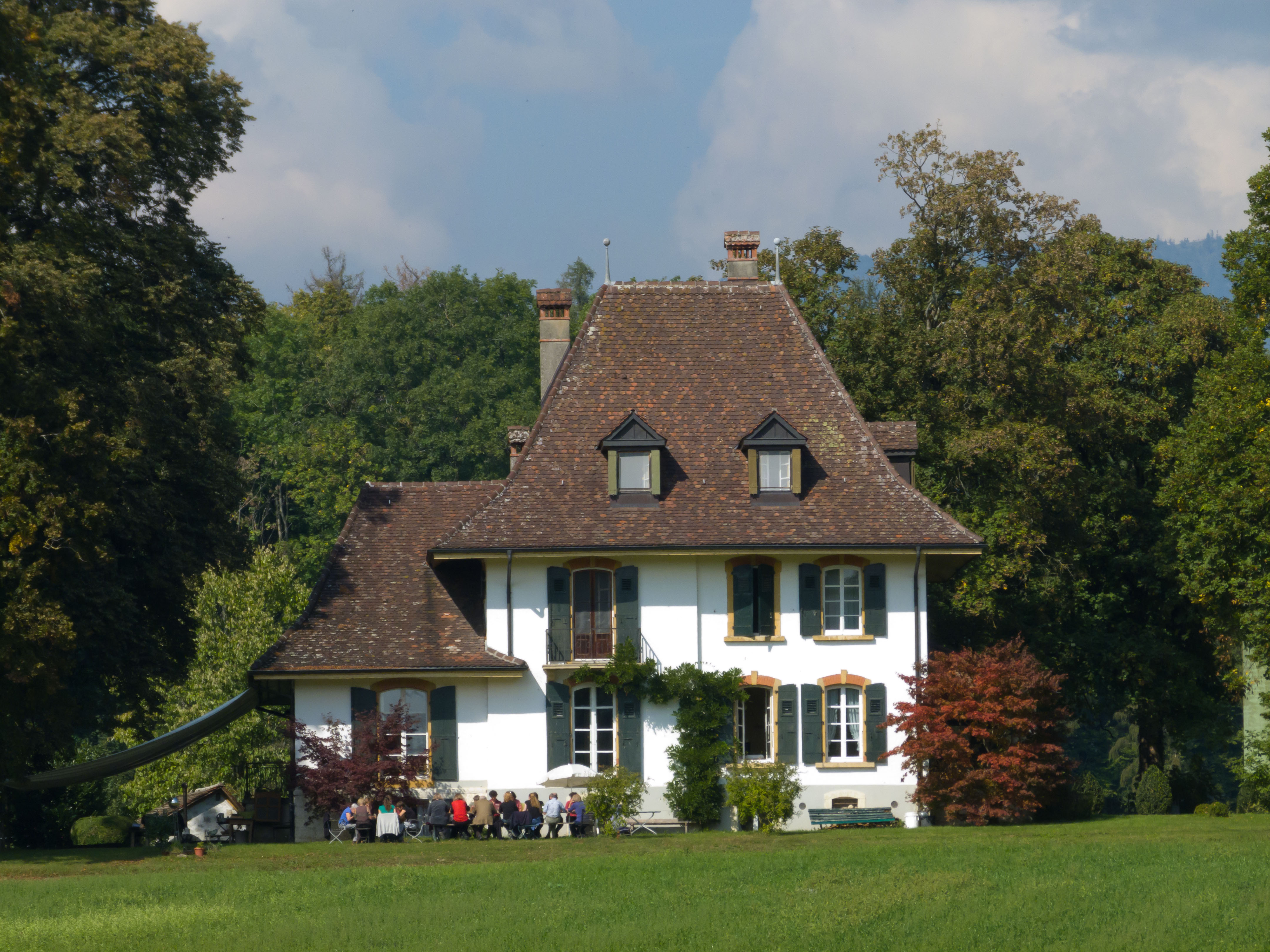 Jolimontgut, Villa